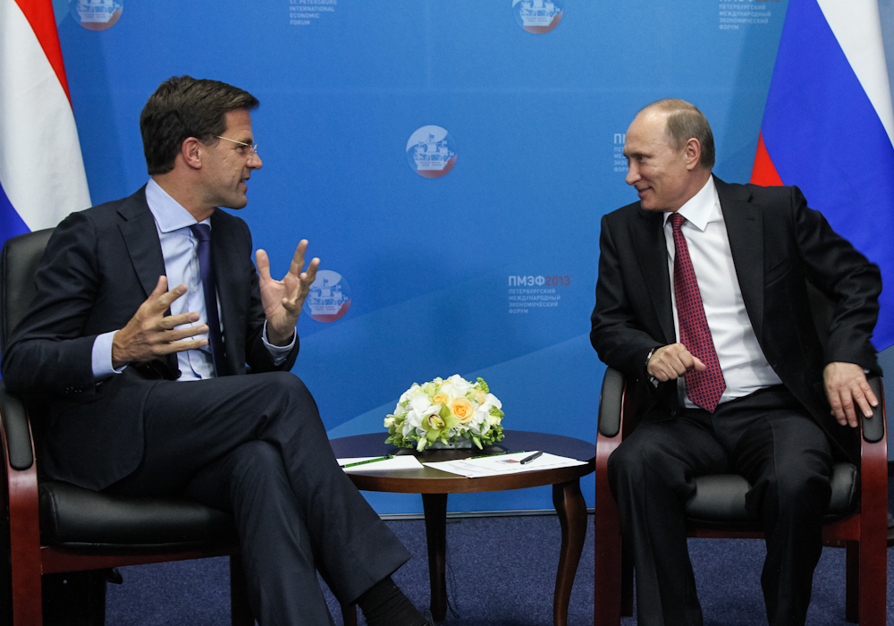 Aansluitend op de Business Round Table heeft minister-president Rutte een ontmoeting en lunchbespreking met president Poetin. Ook hier staan de onderlinge handelsbetrekkingen hoog op de agenda. Nederland exporteert jaarlijks voor ongeveer 6,5 miljard euro naar Rusland. Andersom is dat ongeveer 17 miljard. Op diverse terreinen is nog groei mogelijk, zoals energie, agrofood, de maritieme sector, medische technologie en infrastructuur. Minister-president Rutte is in Rusland voor het St. Petersburg International Economic Forum (SPIEF). Tijdens deze jaarlijkse internationale bijeenkomst in het Russische St. Petersburg spreken politici, vertegenwoordigers van het bedrijfsleven, hoogleraren en journalisten over de economische uitdagingen en kansen in de wereld. Nederland is dit jaar eregast in verband met het Nederland-Ruslandjaar 2013.